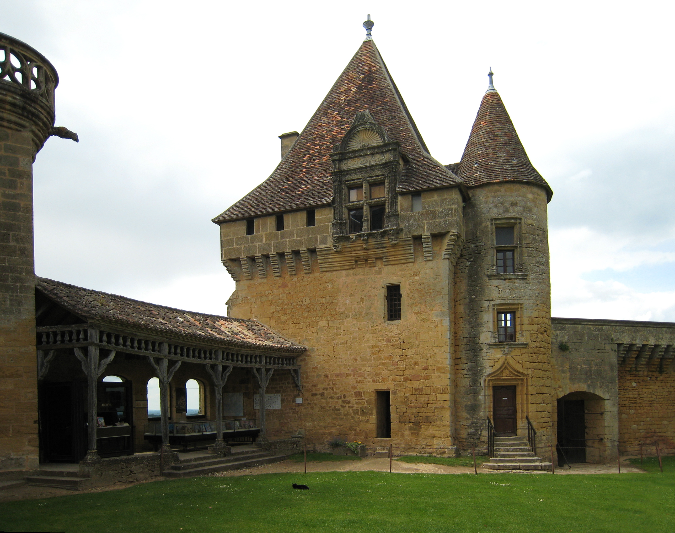 Château de Biron, à Biron, Département Dordogne, France - tour du concierge. .